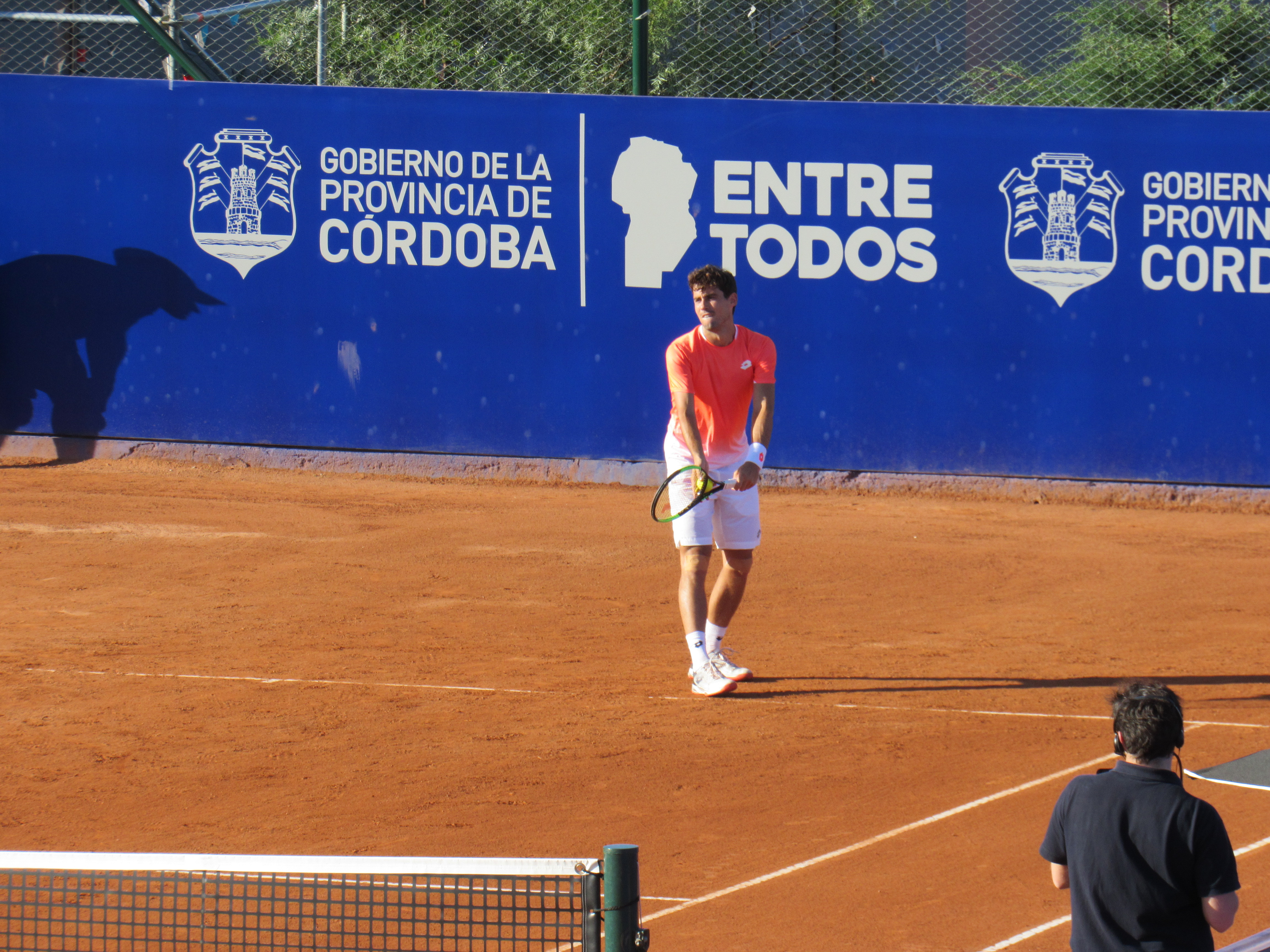 ATP 250 Córdoba Open 2019, Primera Ronda del Cuadro Principal - Predio del estadio Mario Alberto Kempes